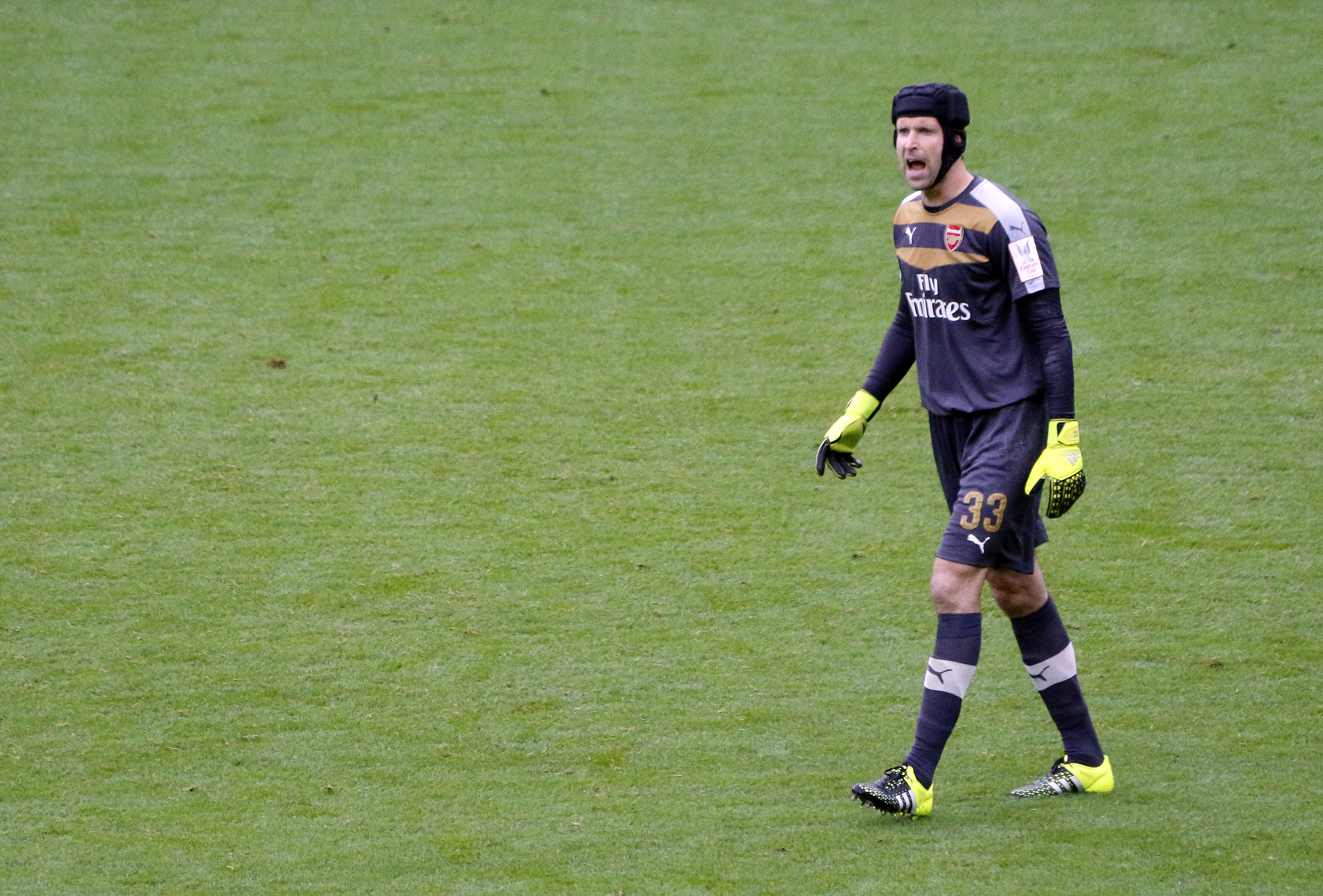 Emirates Cup 2015, Emirates Stadium